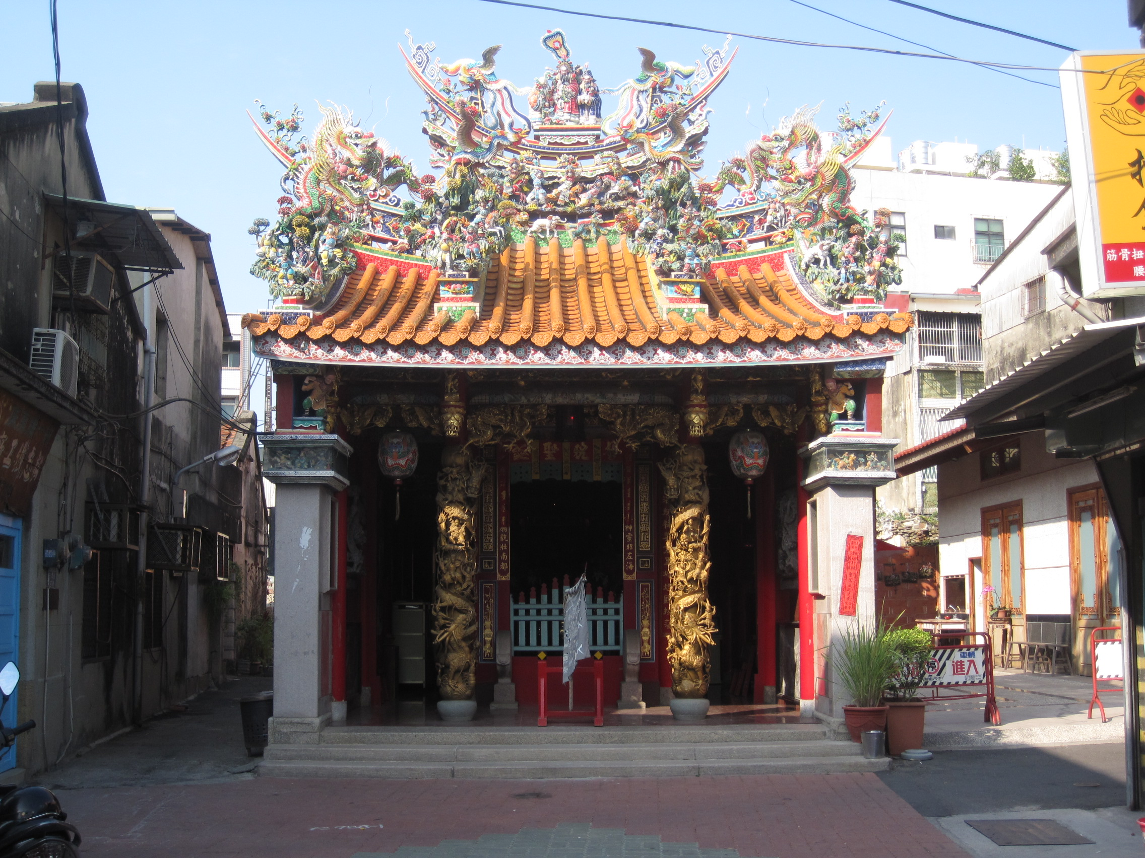 媽祖樓天后宮